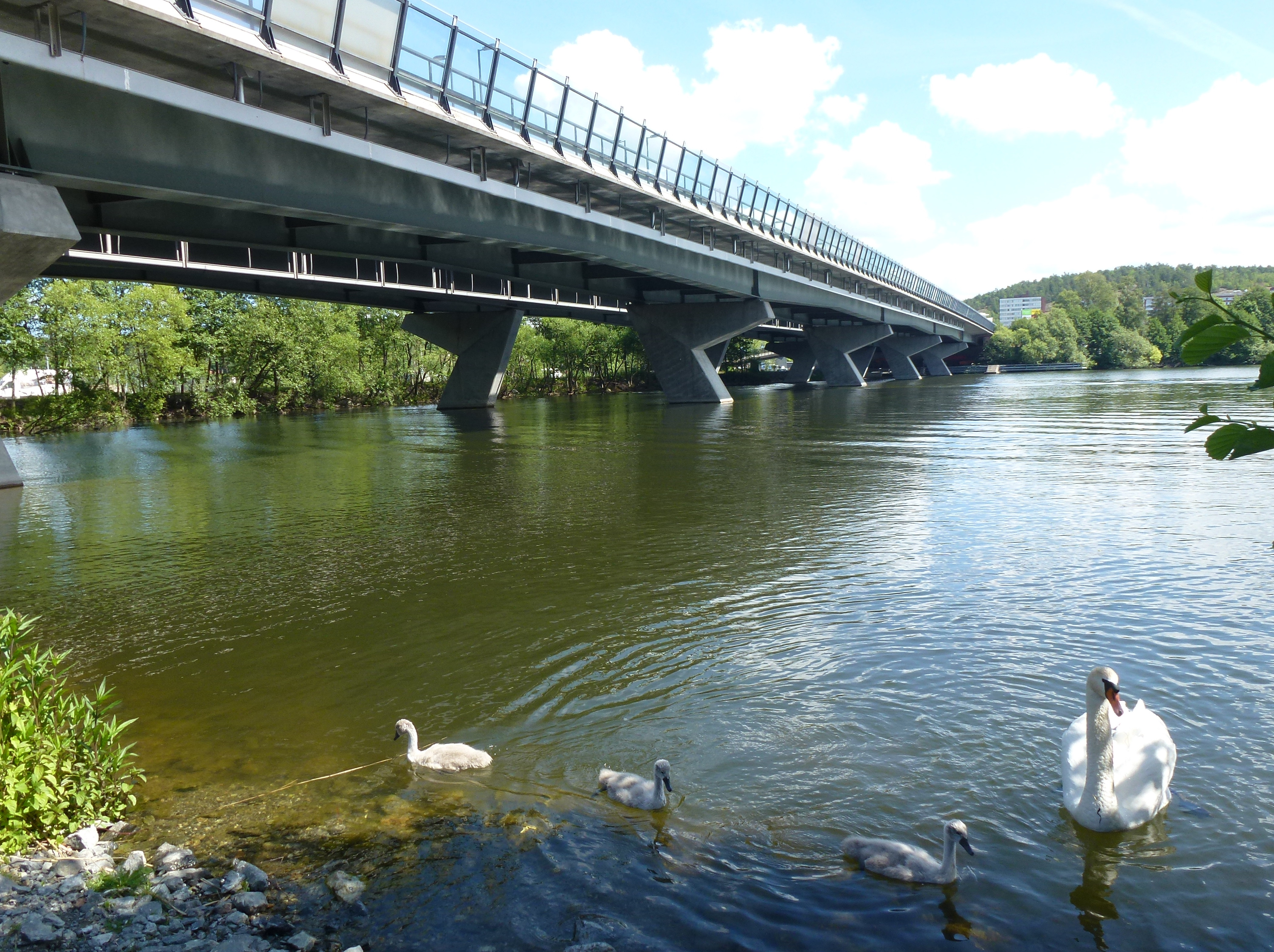 Vårbybron från väst